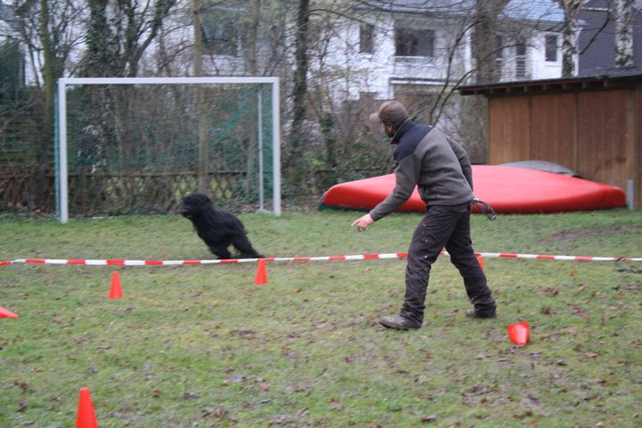 Longieren mit Hund, Start mit Öffnung nach Links